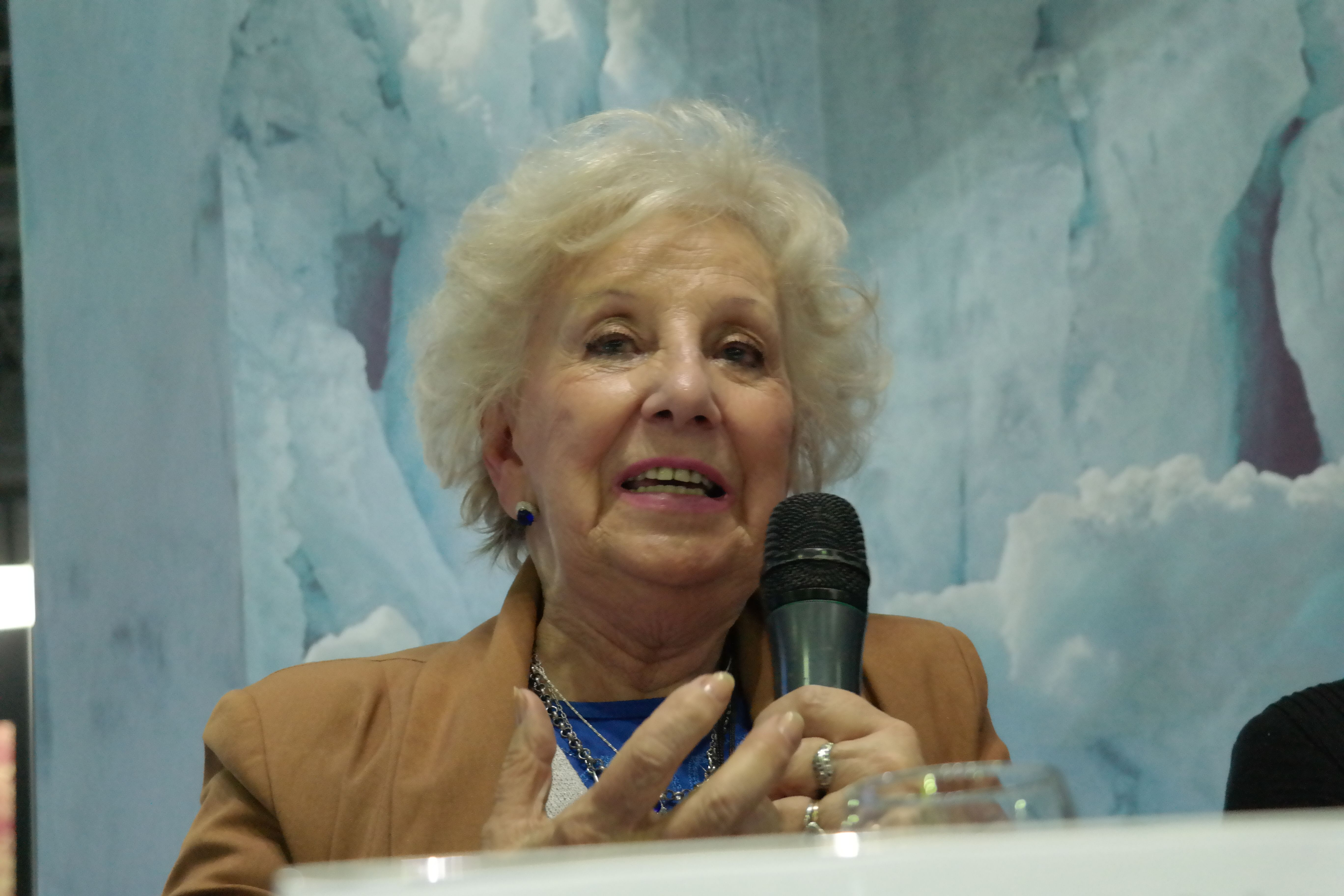 A ativista argentina Estela de Carlotto participa de debate sobre direitos humanos, no estande da Argentina, país homenageado na 17ª Bienal do Livro do Rio de Janeiro.